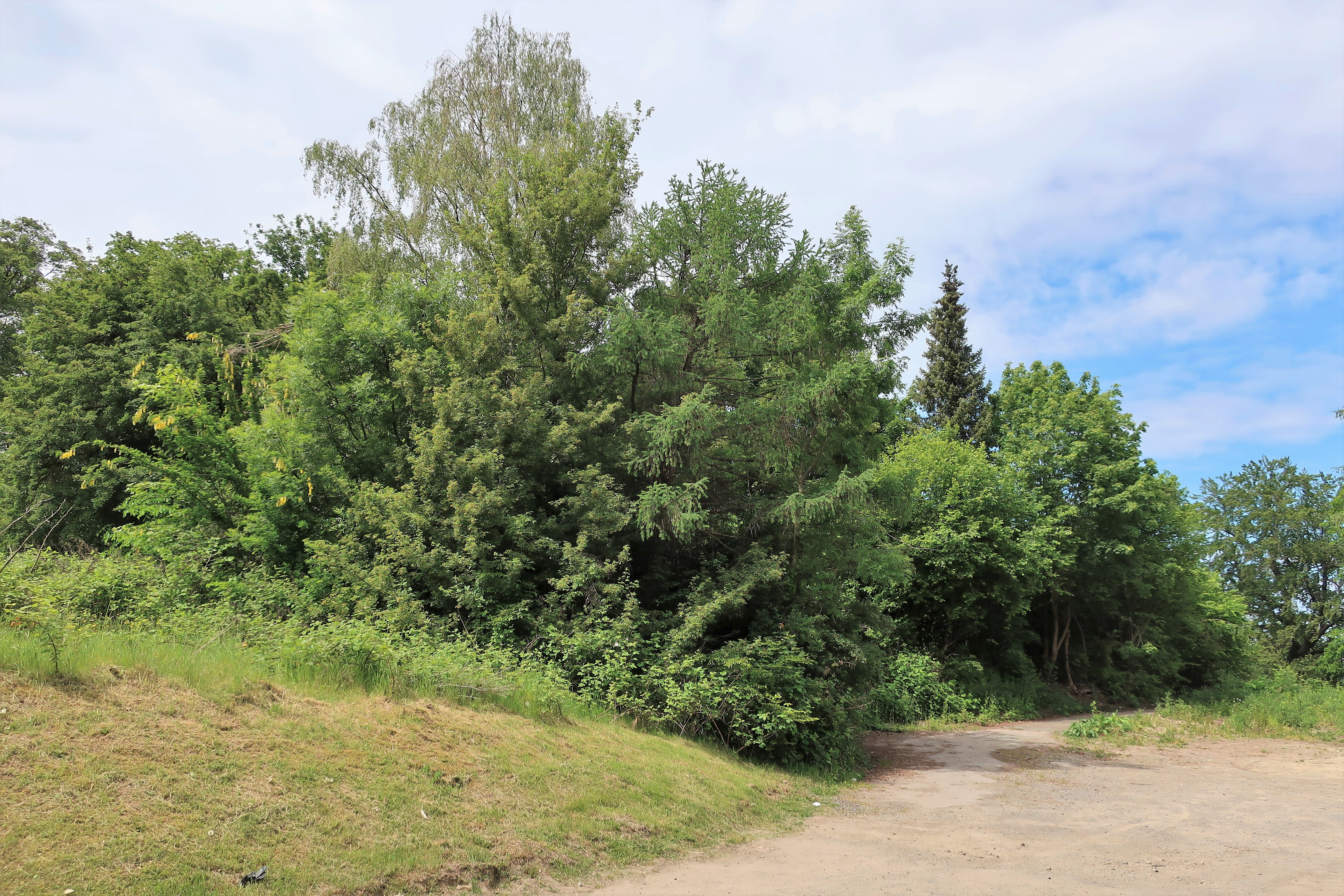 Geschützter Landschaftsbestandteil 1.4.2.46 „Wäldchen Remberg“ in Hagen, zwischen Liebigstraße und Remberg-Friedhof. Es handelt sich um einen wertvollen Laubholzbestand mit artenreicher Kraut- und Strauchvegetation auf bewegtem Gelände in Verbindung mit einem nördlich angrenzenden Wiesenstück, auf dessen Nordgrenze sich eine Baumreihe bestehend aus sechs z.T. alten Buchen und Eichen befindet.